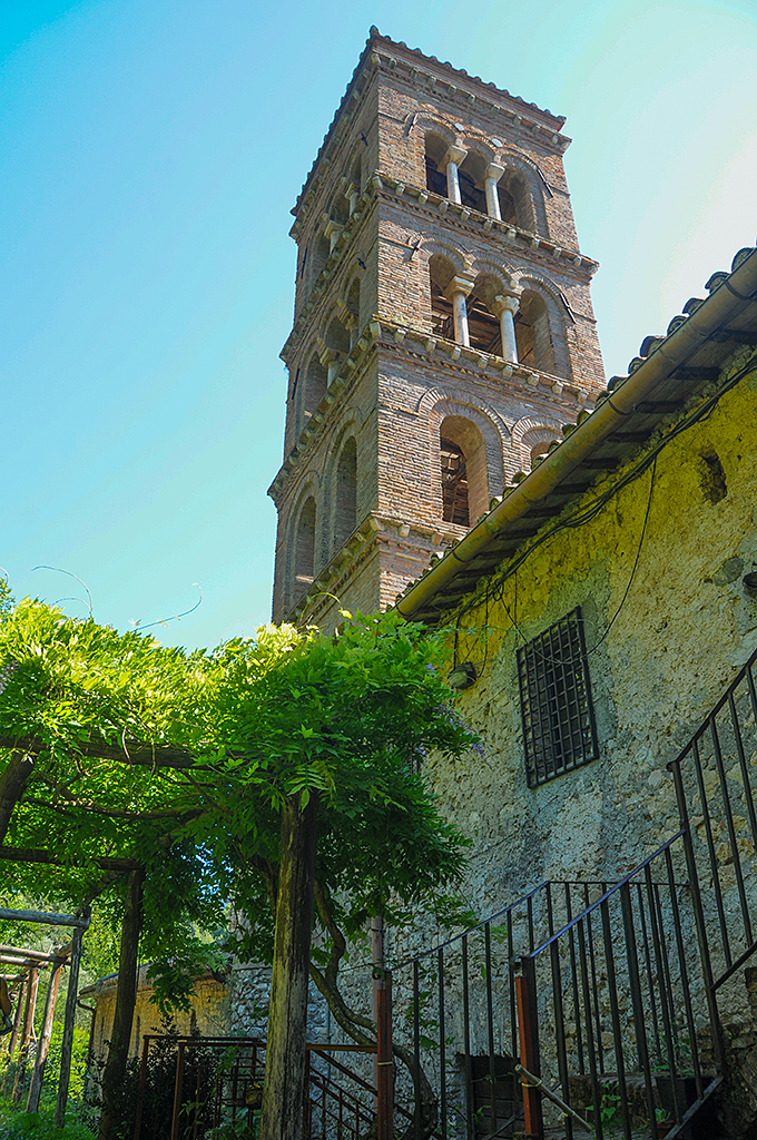 San Giovanni in Argentella - Palombara Sabina